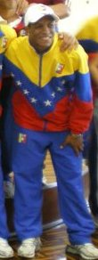 Vinotinto rueda de prensa